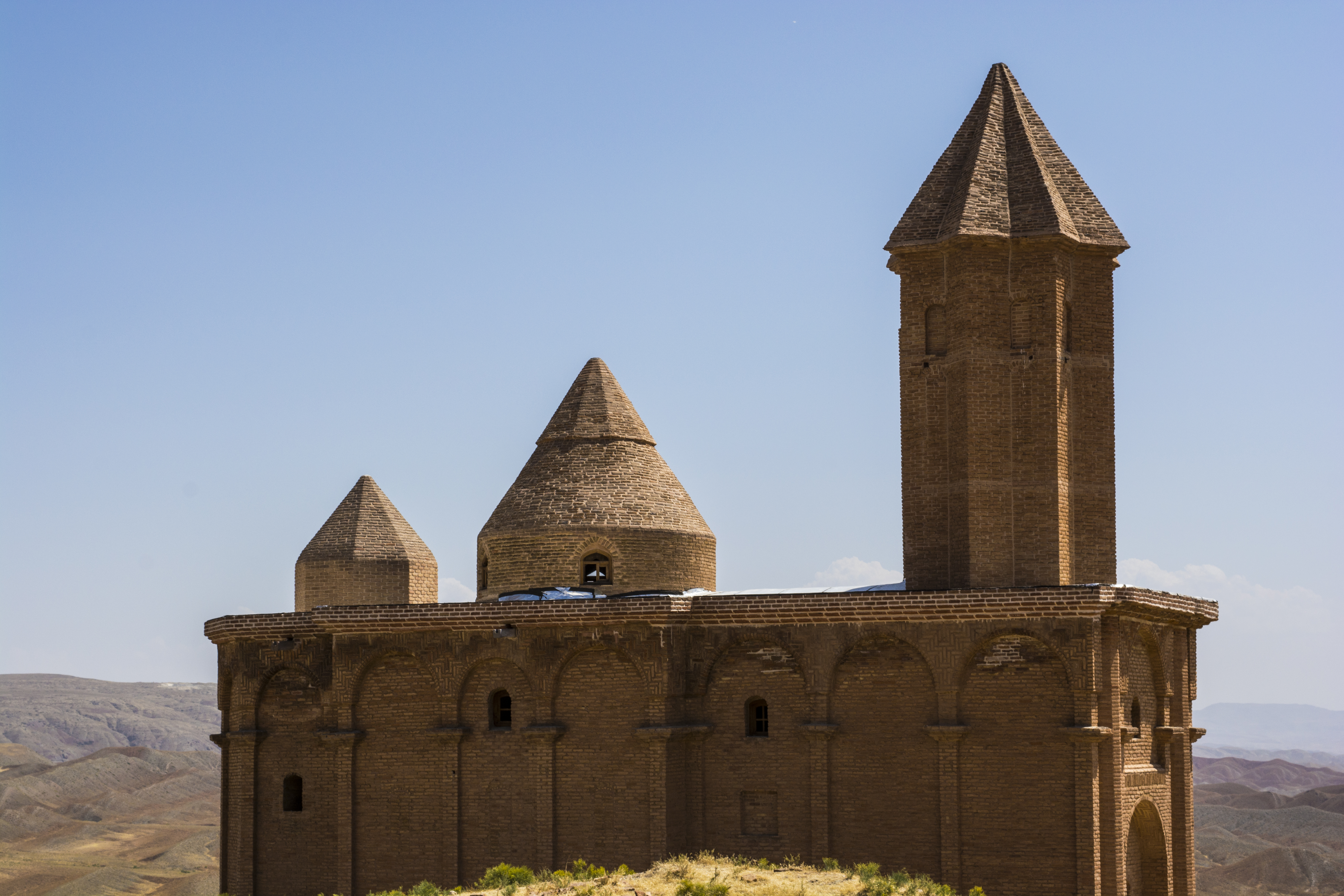 کلیسای سهرقه (سهرل)